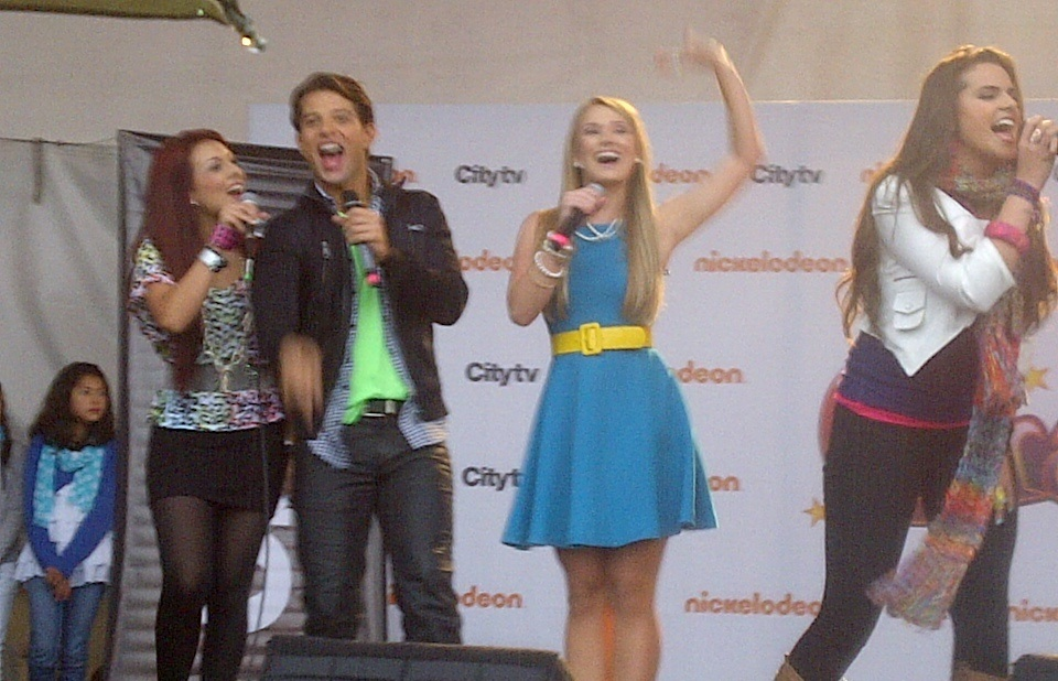 Elenco Grachi en C.C. Gran Estación, cantando la canción de Grachi